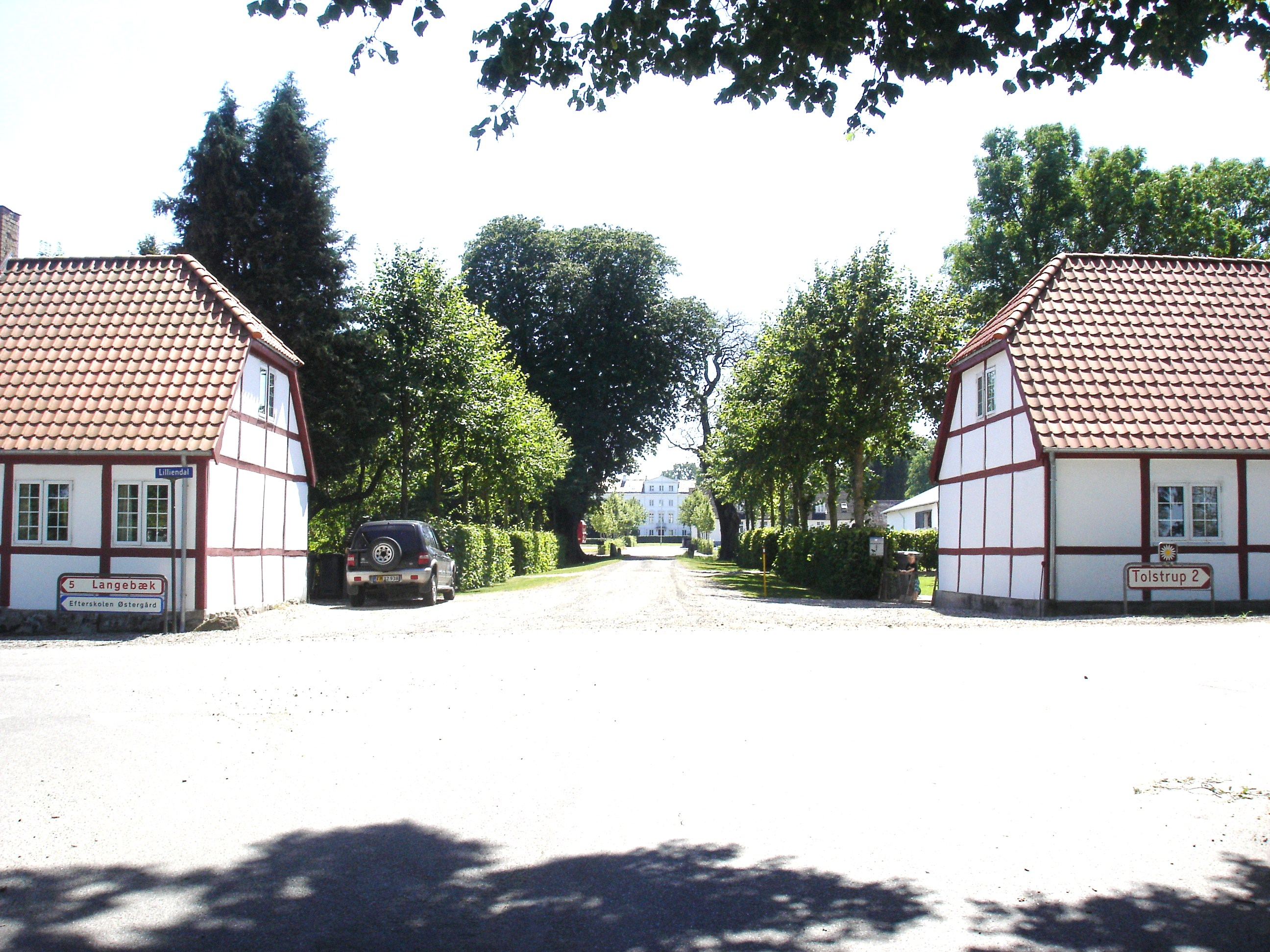 Lilliendal, set fra vejen af samme navn